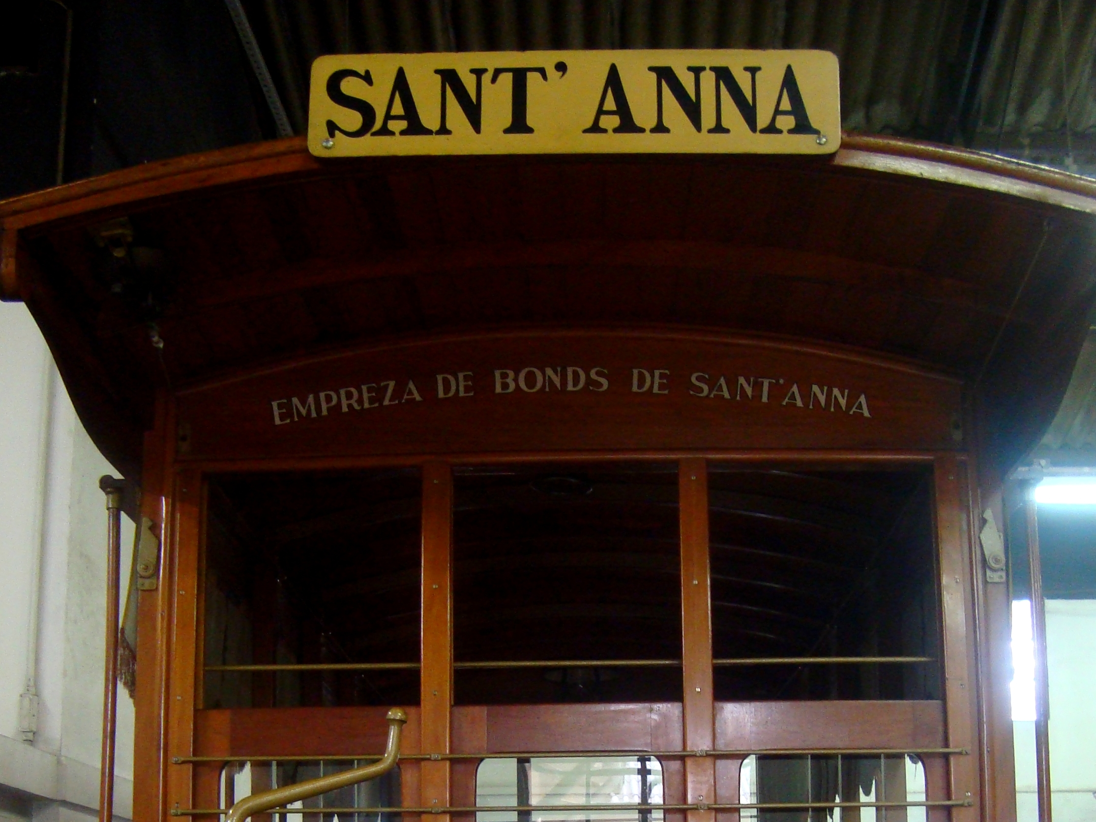 Placa em um bonde do Museu do Transporte Público Gaetano Ferolla em São Paulo